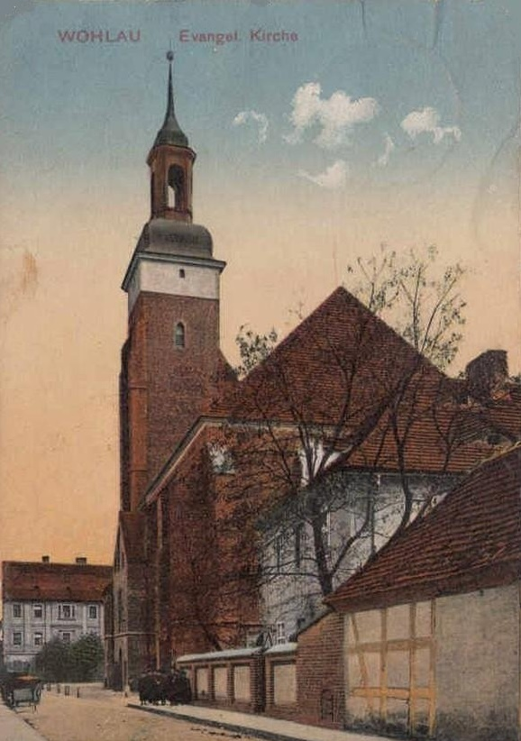 na pocztówce z 1914 r.